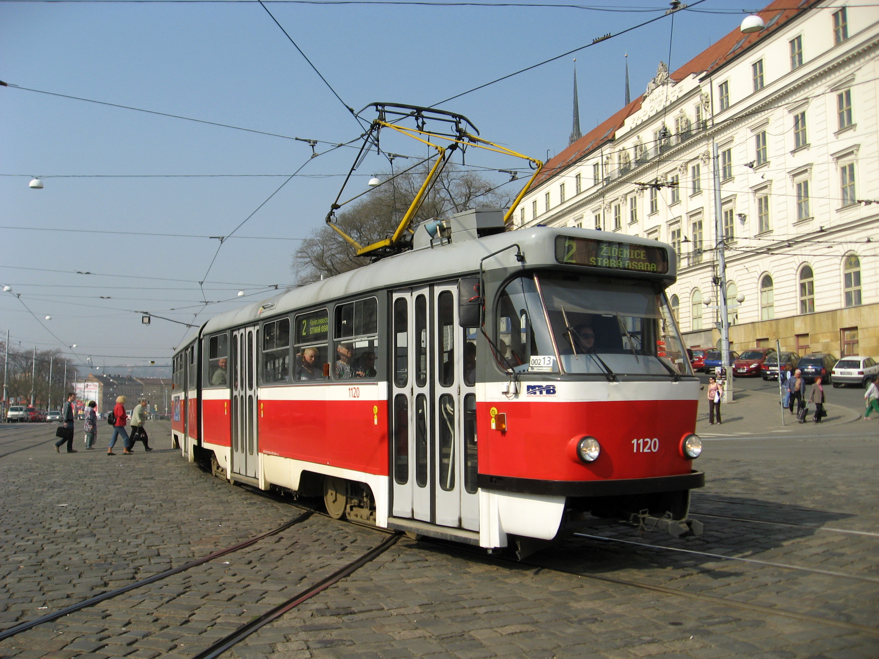 Tatra K2 v Brně